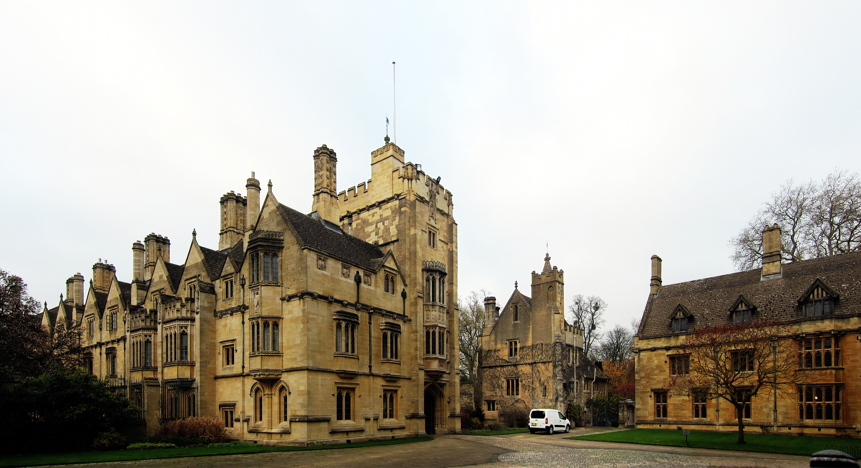 La cour d'entrée du Magdalen College à Oxford.